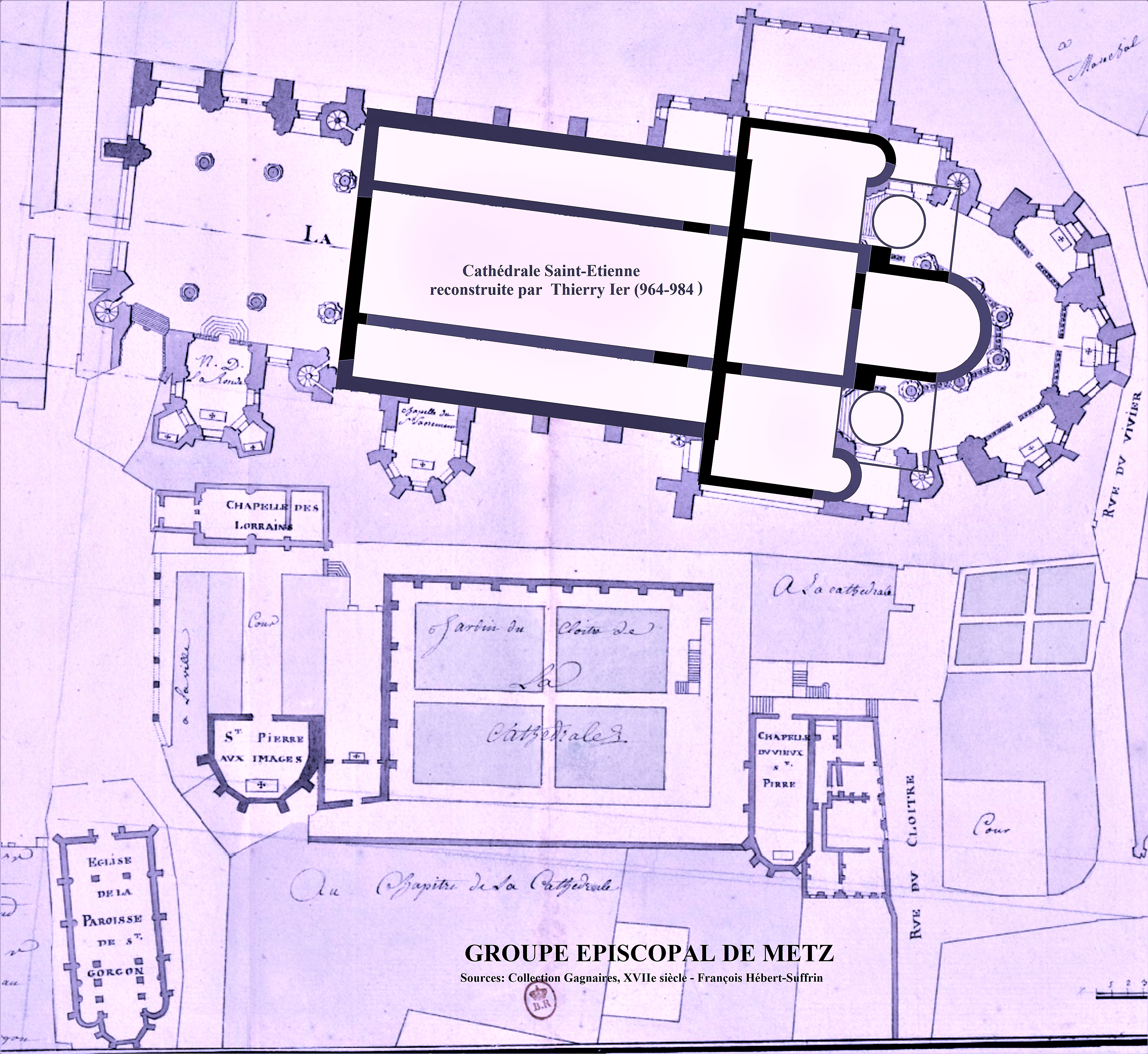 Metz, Groupe épiscopal (image du domaine public modifiée (Gaignières 17e siècle)